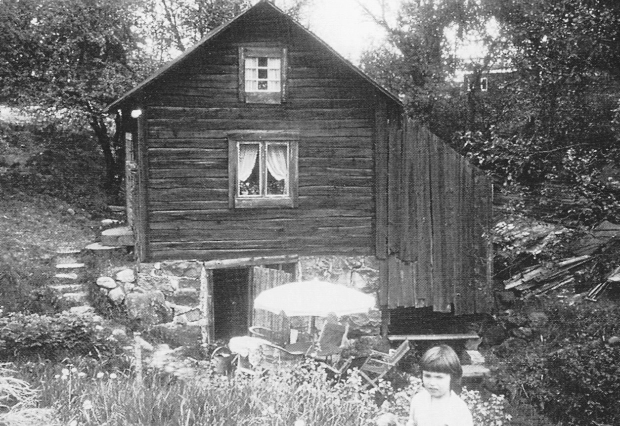 Sätra gårds vattenkvarn